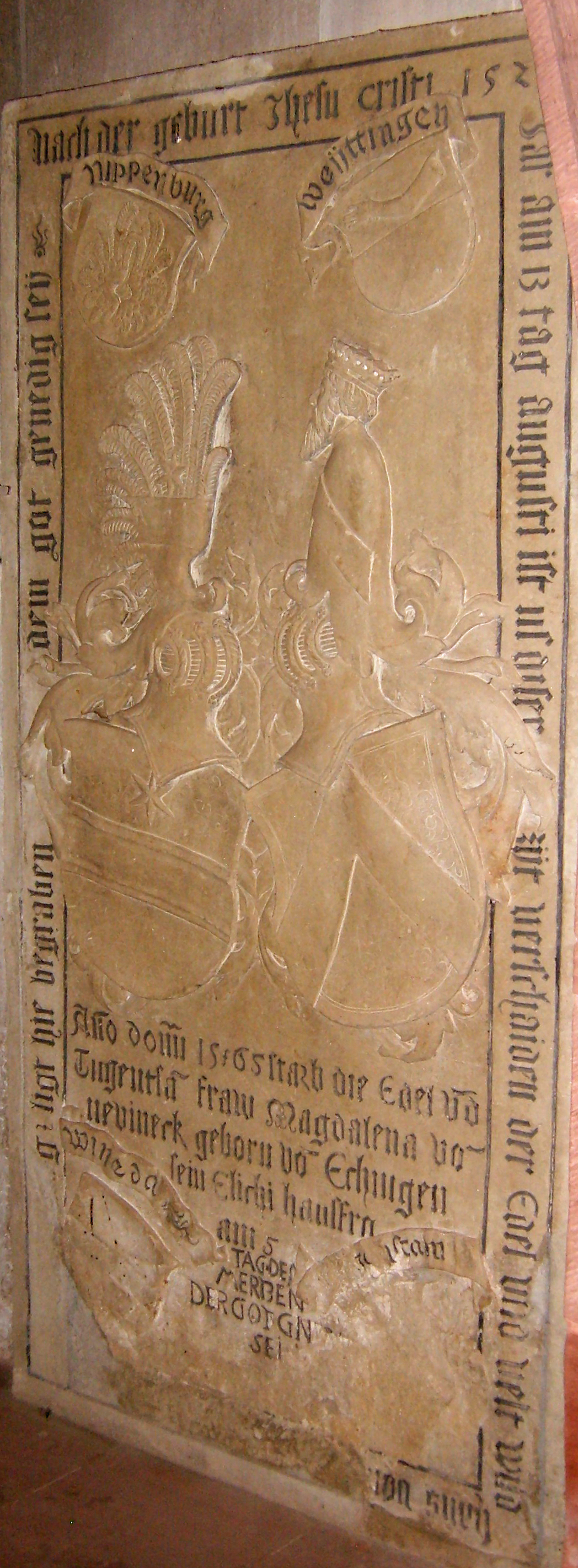 Pfarrkirche zu Glatt. Epitaphe des Wildhans von Neuneck († 1508) und Magdalena von Ehingen († 1565)